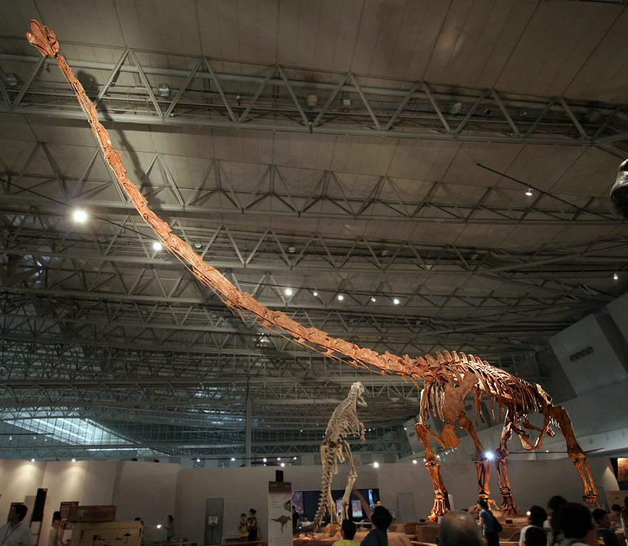 Mamenchisaurus sinocanadorum - 03